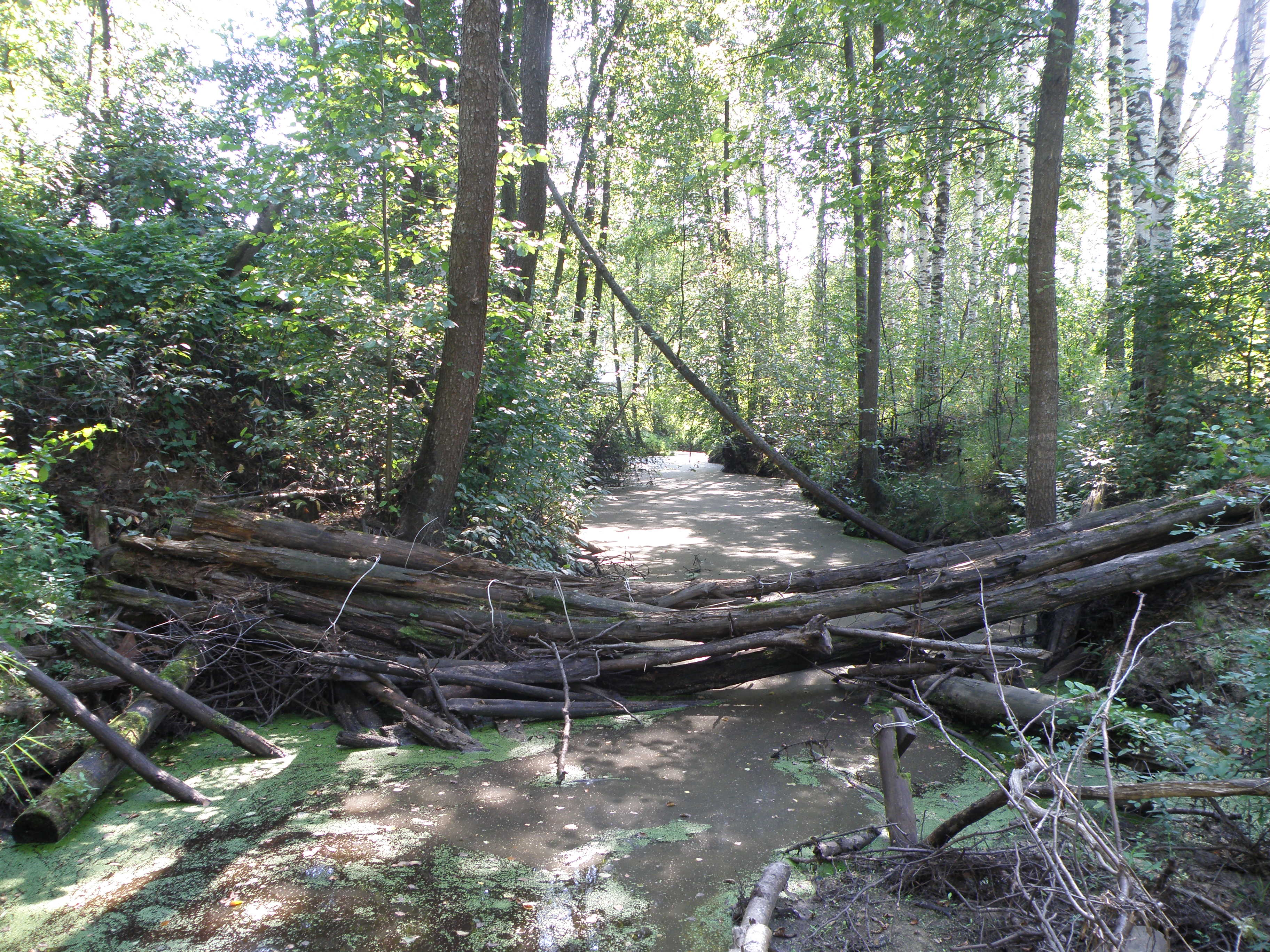 Речка Таса близ ж. д.